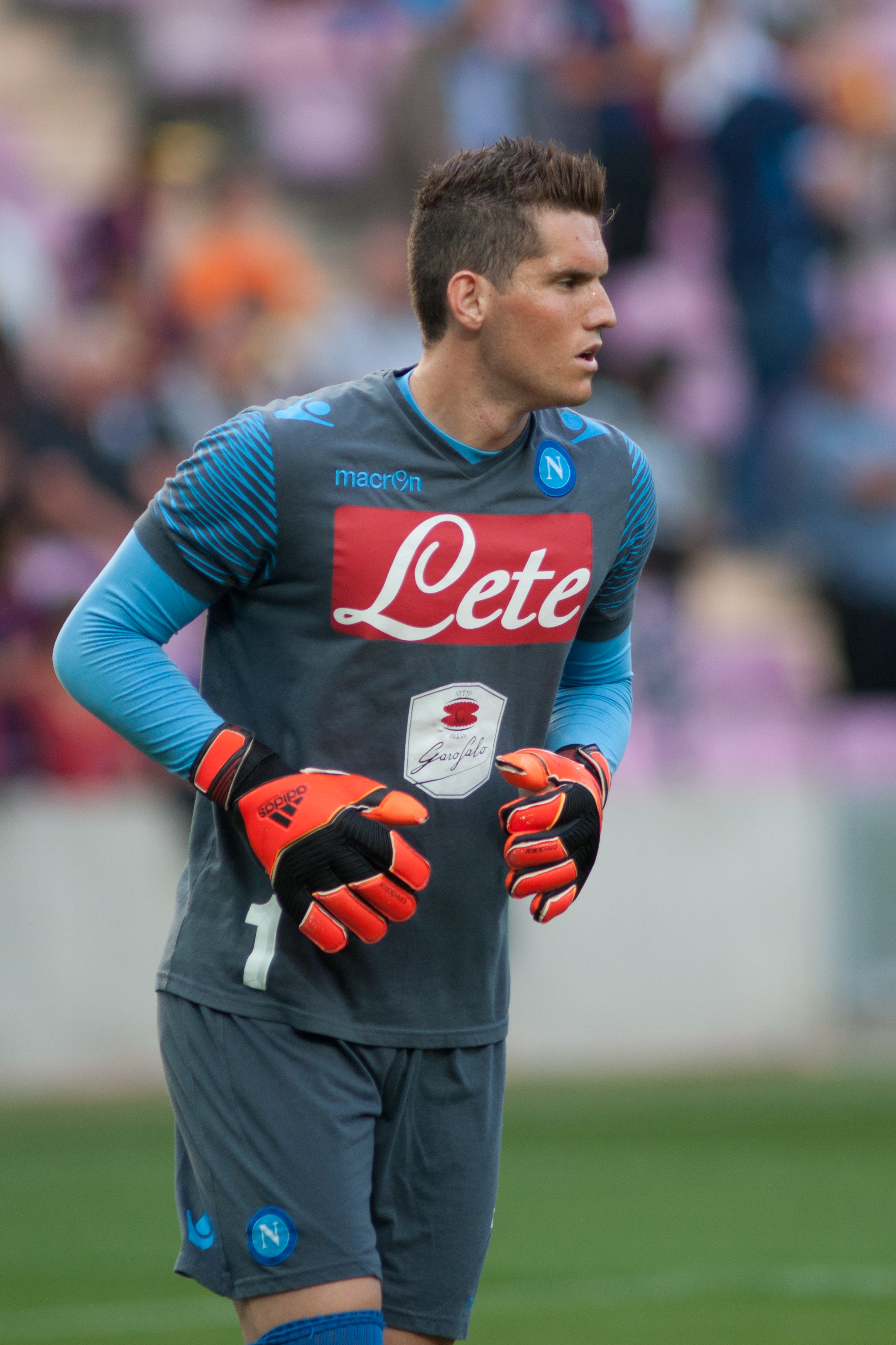 Naples vs Barcelone - Genève - aout 2014 - Rafael Cabral